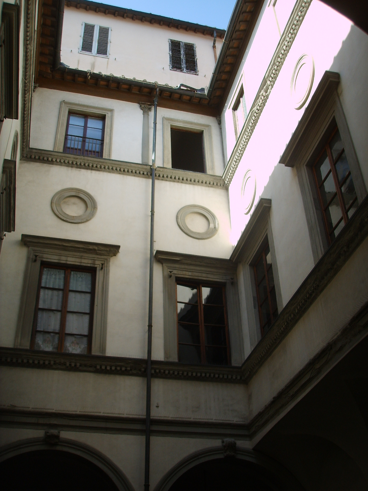 Palazzo corsini antinori, ordine architettonico interno